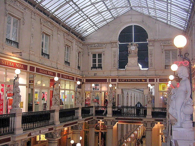 Passage Pommeraye, Nantes (France)